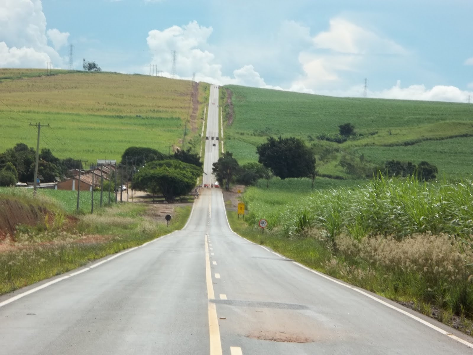 Vista parcial da Rodovia Americana-Paulínia, no Interior de São Paulo.